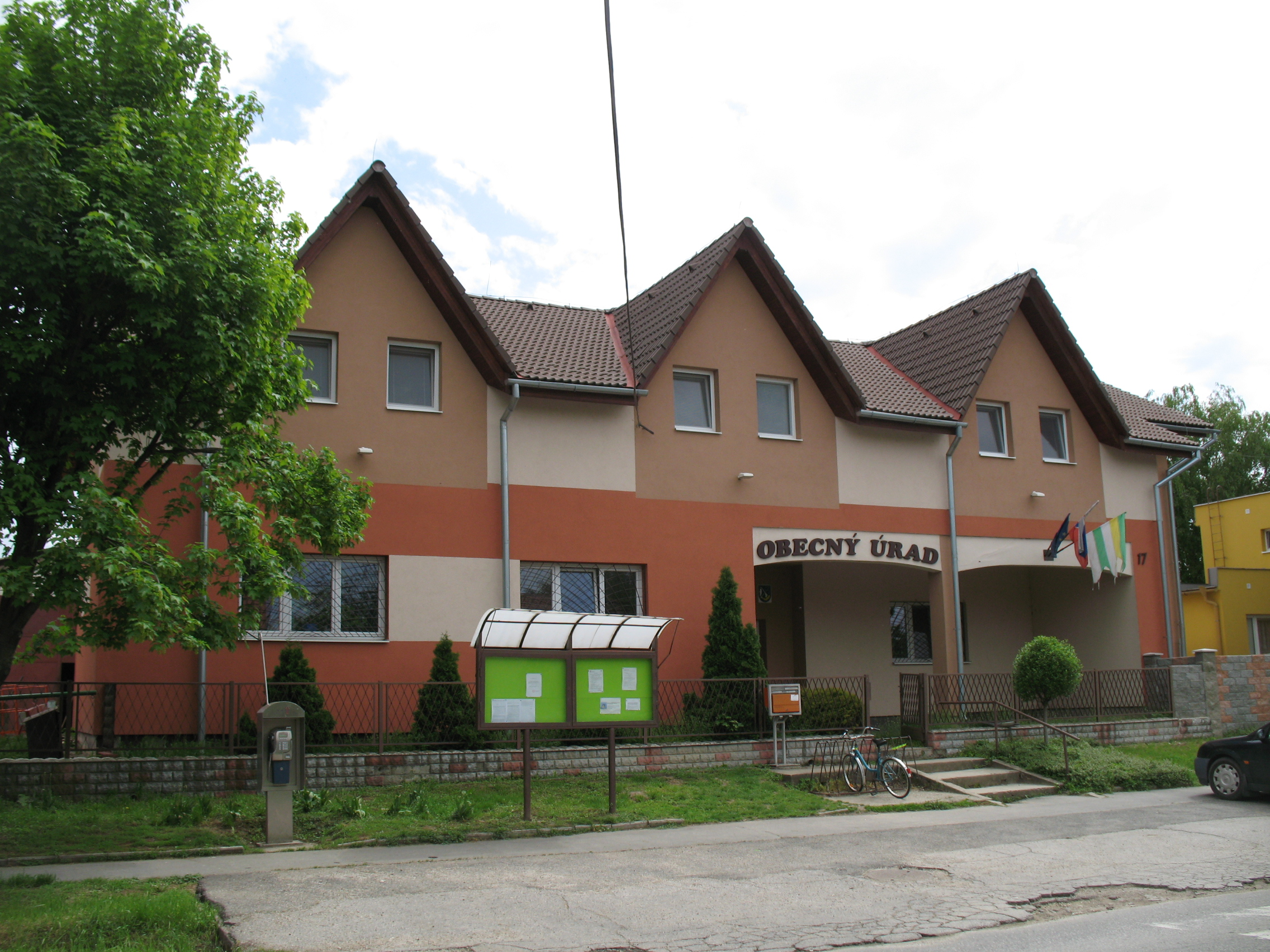 Királyi